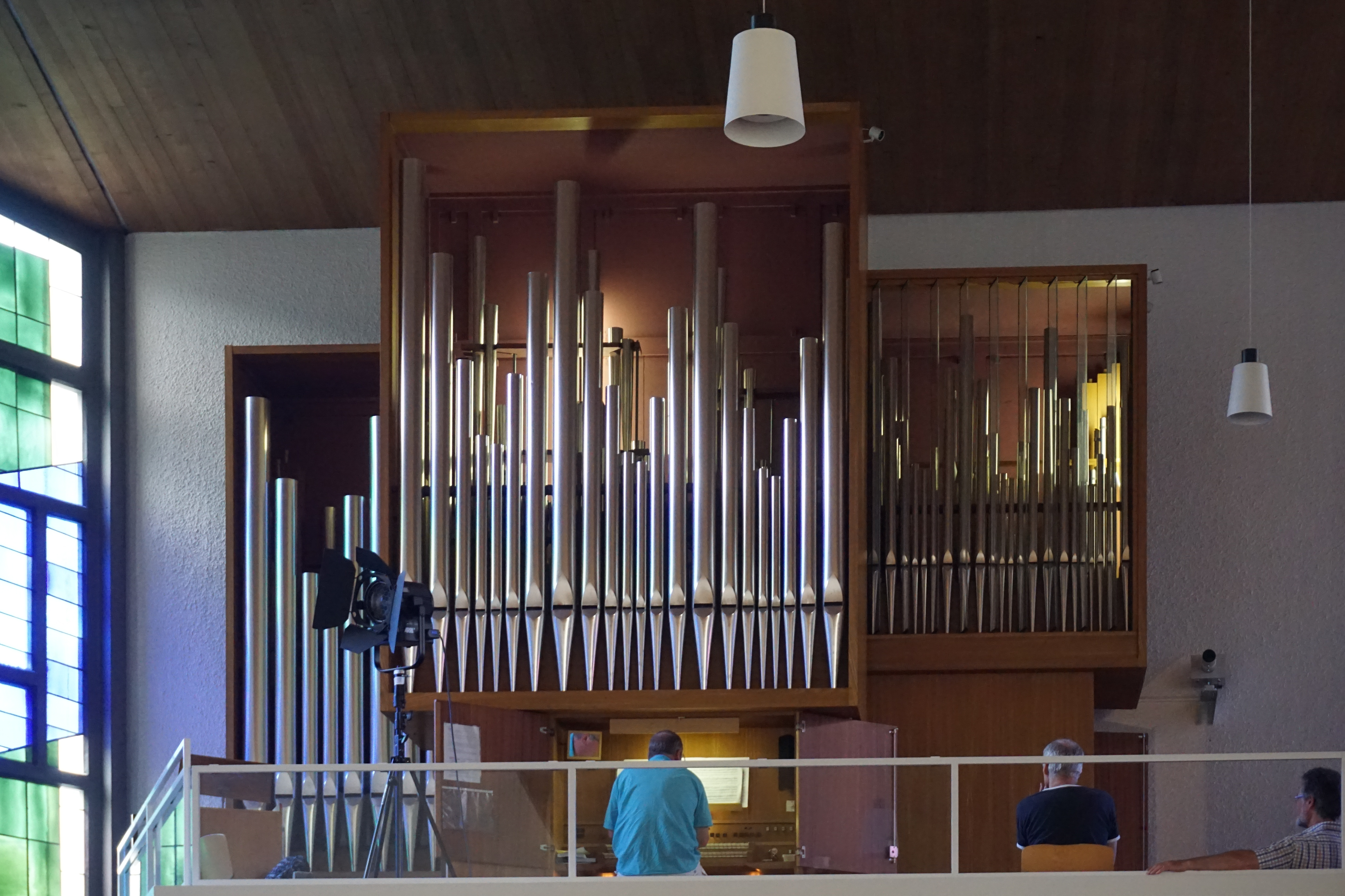 Orgel der Michaelskirche von 1970